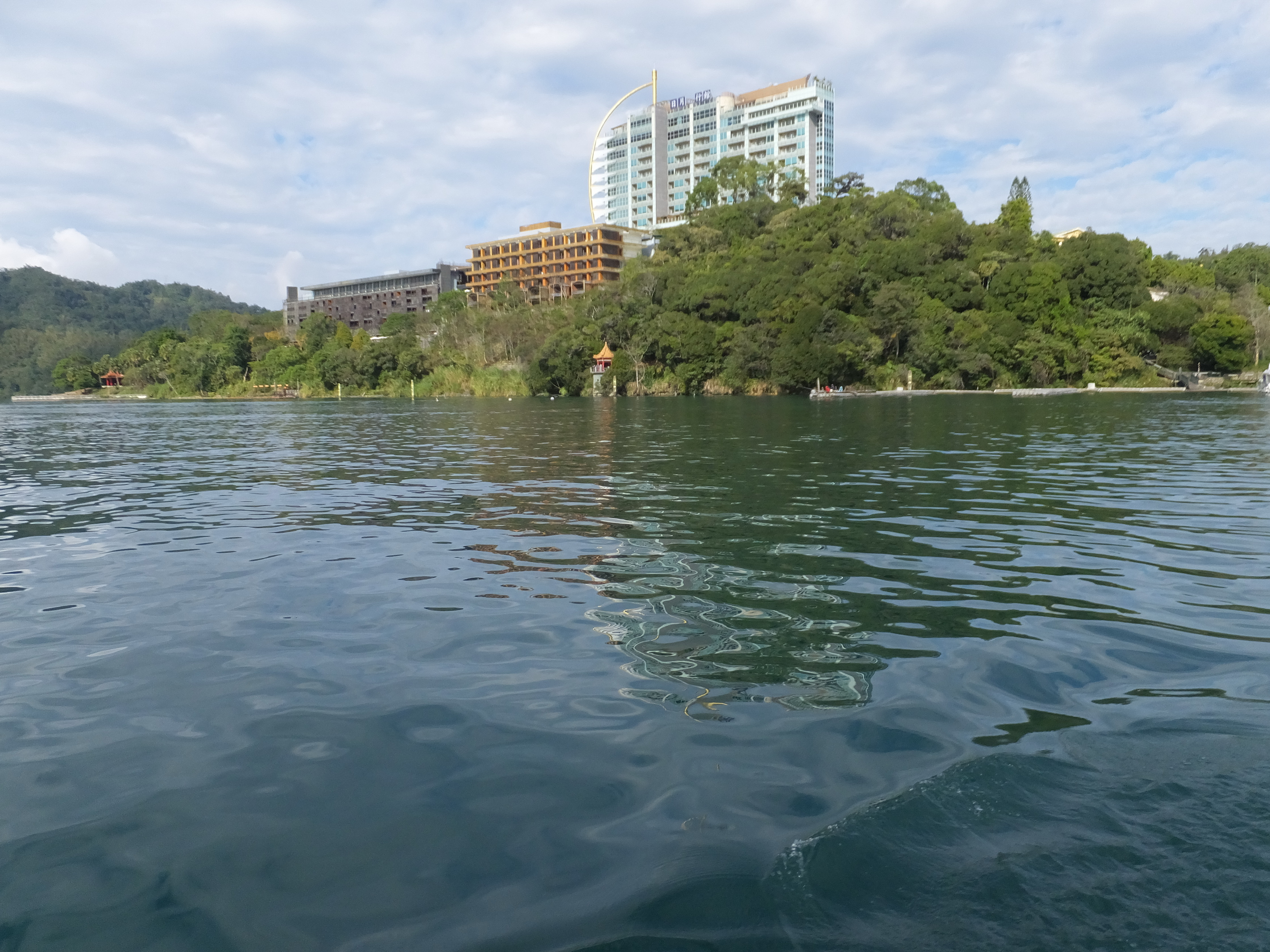 涵碧半島 Hanbi Peninsula